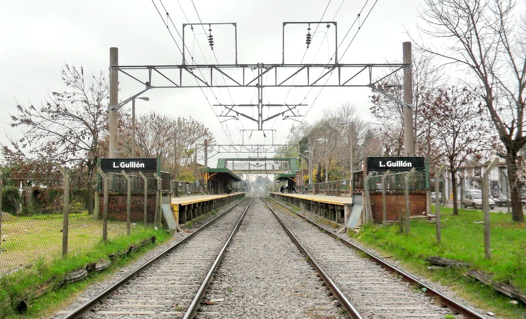 Vista desde la barrera.